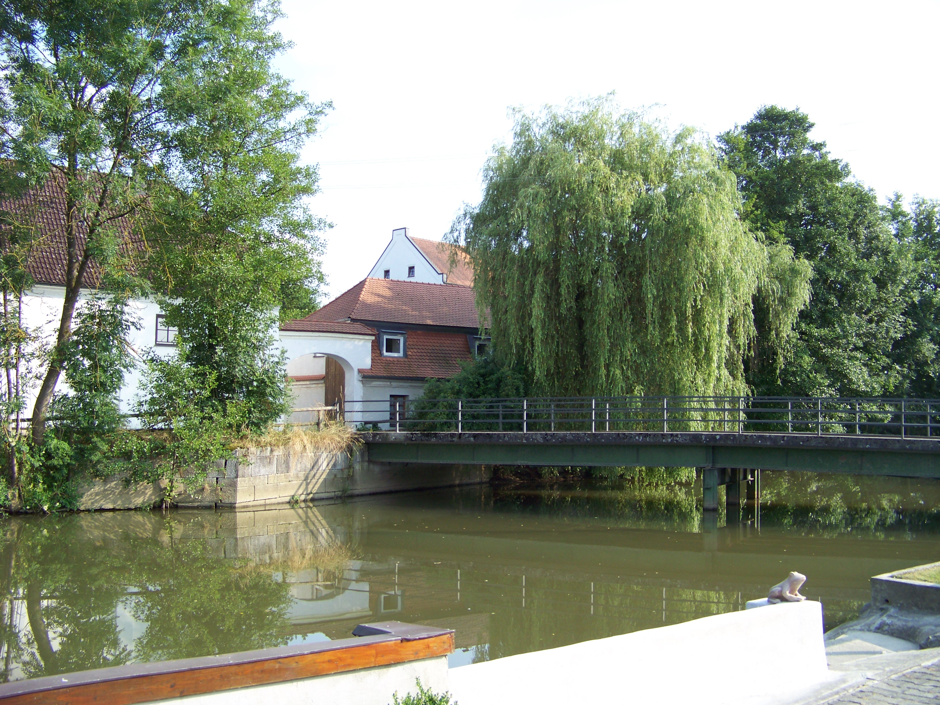 Aham, Schloss. von der großen Vils und einem Wassergraben umschlossen; Hauptgebäude mit Schlosskapelle St. Georg, Untergeschoss spätmittelalterlich, Ausbauten im 18. Jahrhundert; mit Ausstattung; großes dreiflügeliges Wirtschaftsgebäude, 1749, im Kern älter; lang gestrecktes erdgeschossiges Wohngebäude mit Mansarddach, 1749, im Kern älter.